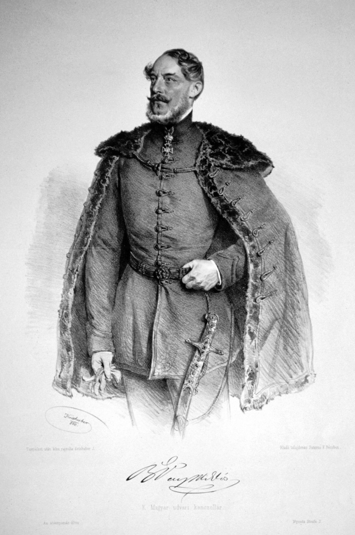 Nikolaus Freuherr von Vay (1802-1894), ungarischer Staatsmann. Lithographie von Josef Kriehuber,1860